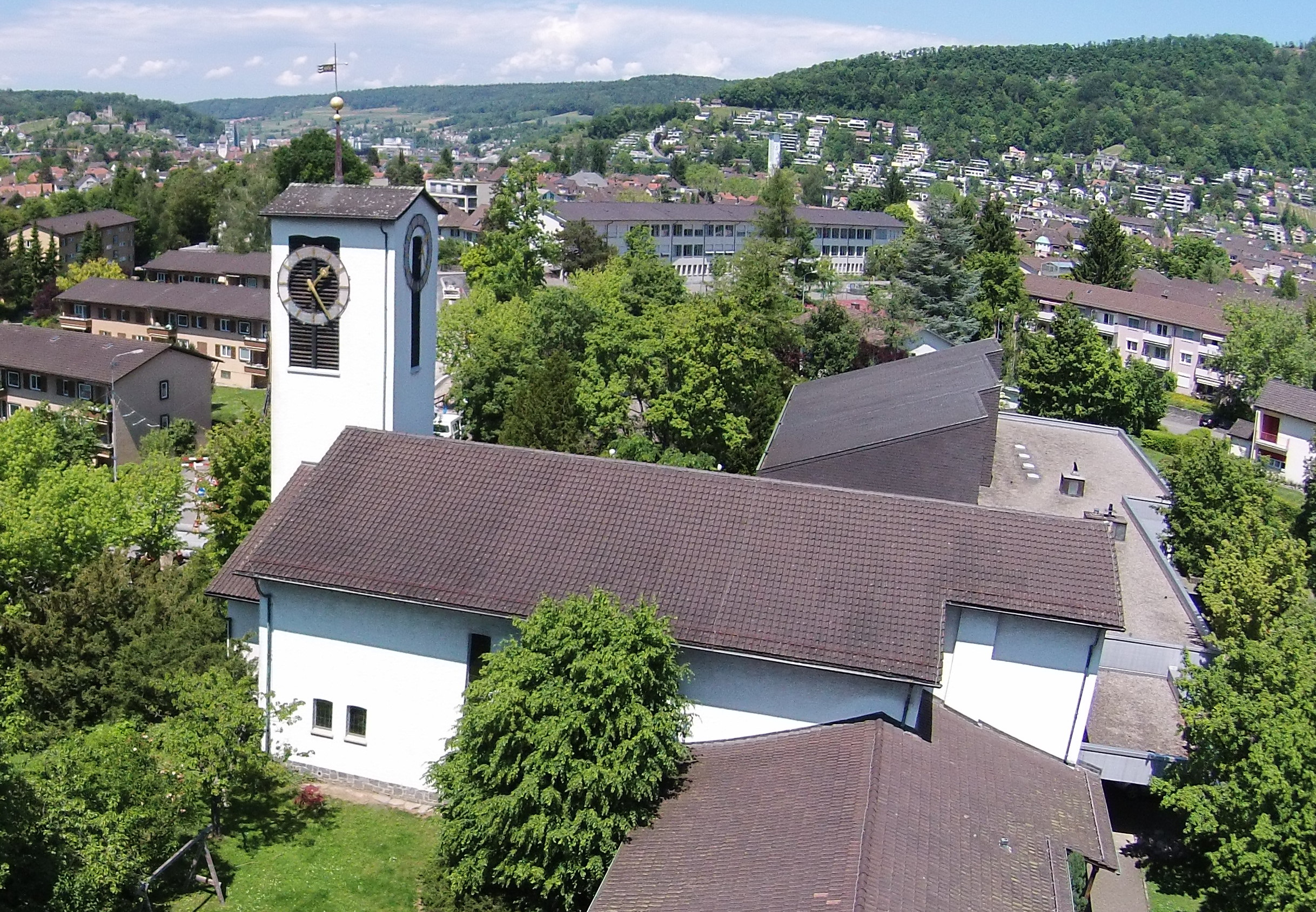 Blick auf die reformierte Kirche Wettingen